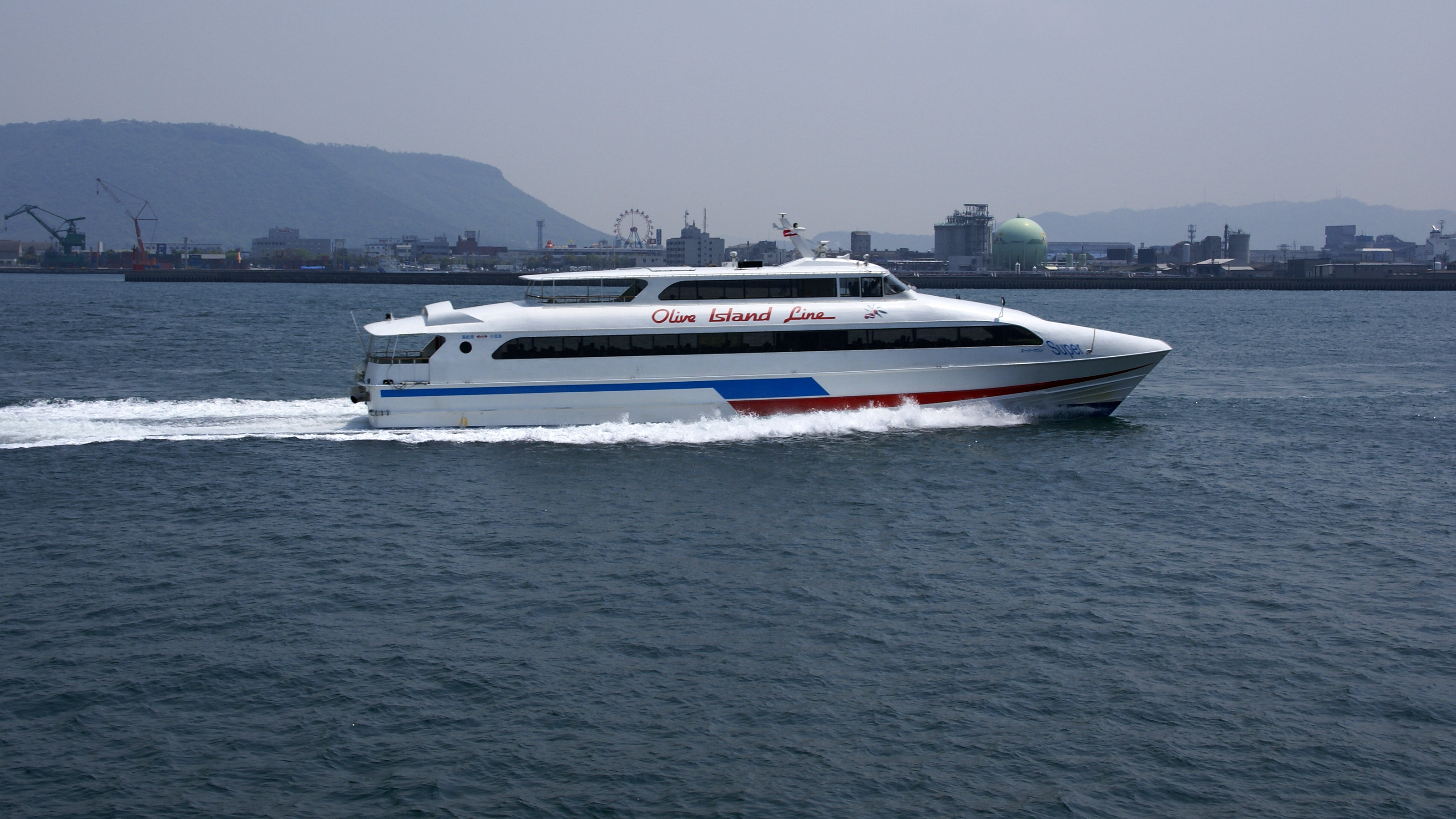 "Super Marine" at Takamatsu port in Takamatsu Kagawa Prefecture, Japan)